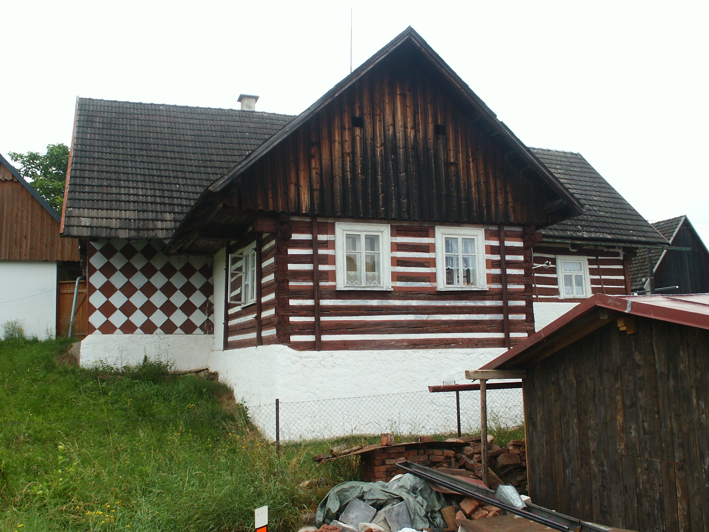 Pustá Proseč - č.p. 9